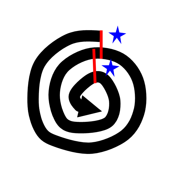 Ausrollung2 Unknown